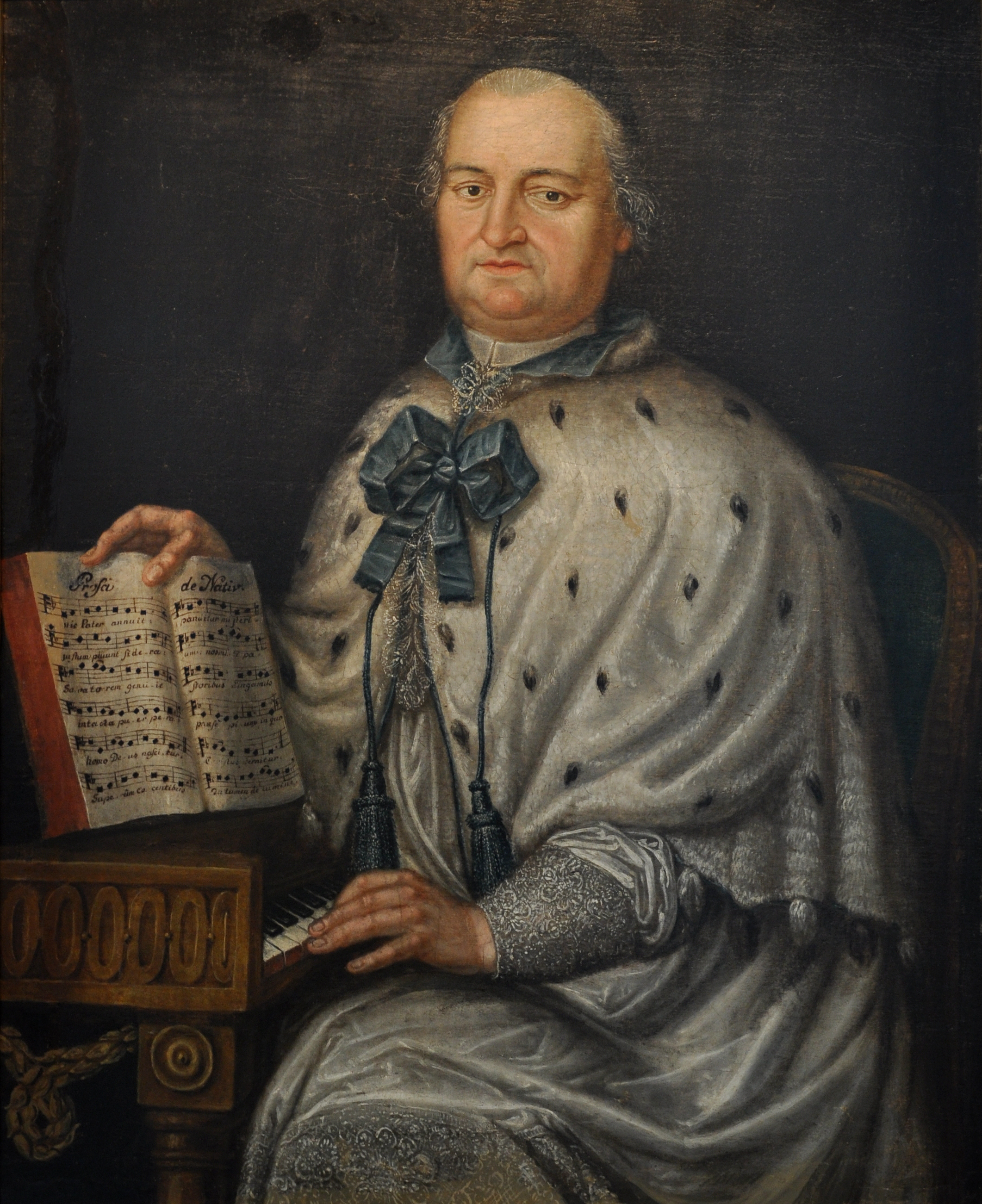 Chorherr Wilhelm Hanser (* 1738 in Unterzell, Rot an der Rot als Johann Nepomuk Joseph Hanser, seit 1758 Chorherr in Schussenried; Komponist und Organist, Musiklehrer in Frankreich, u. a. von Étienne Nicolas Méhul; † 1796), um 1778, Neues Kloster Schussenried